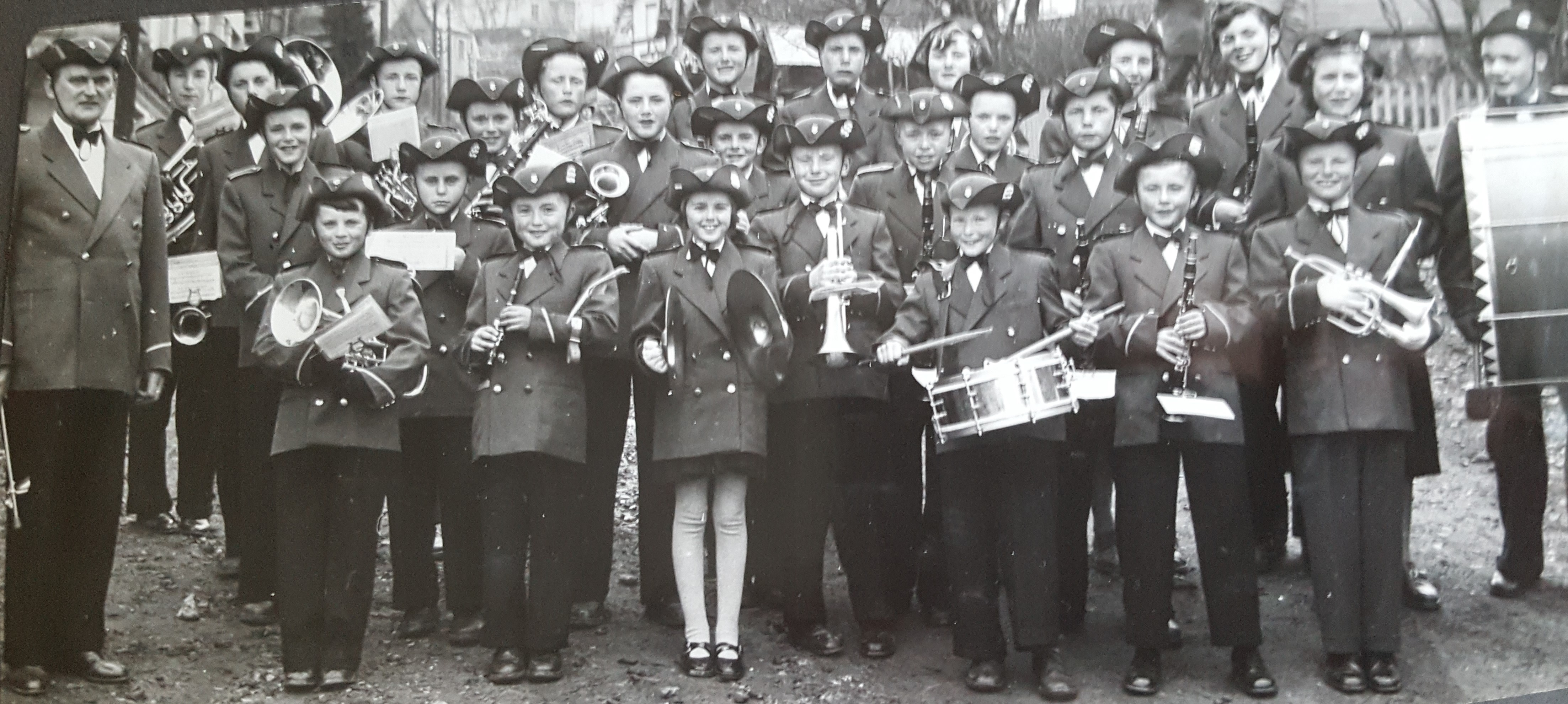 Harstad Folkeskoles Musikkorps på tidlig 50-tall med den første dirigenten Harry Strand.